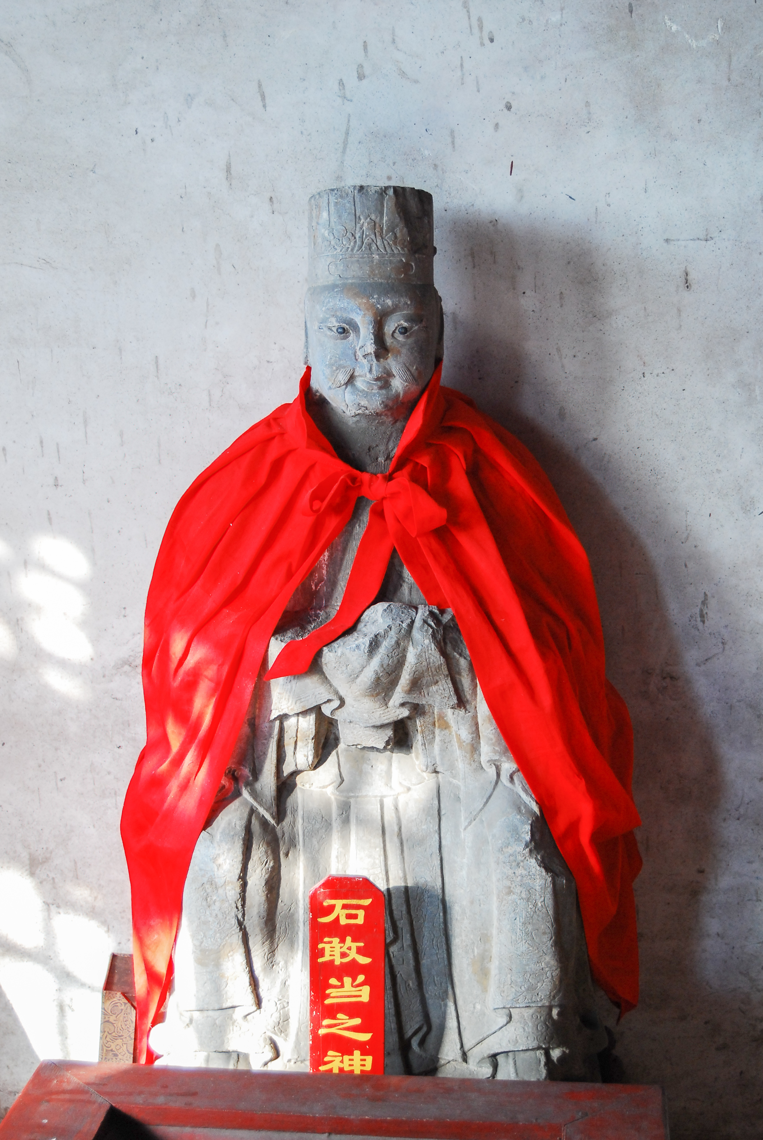 中文（中国大陆）: 泰山石敢当神像